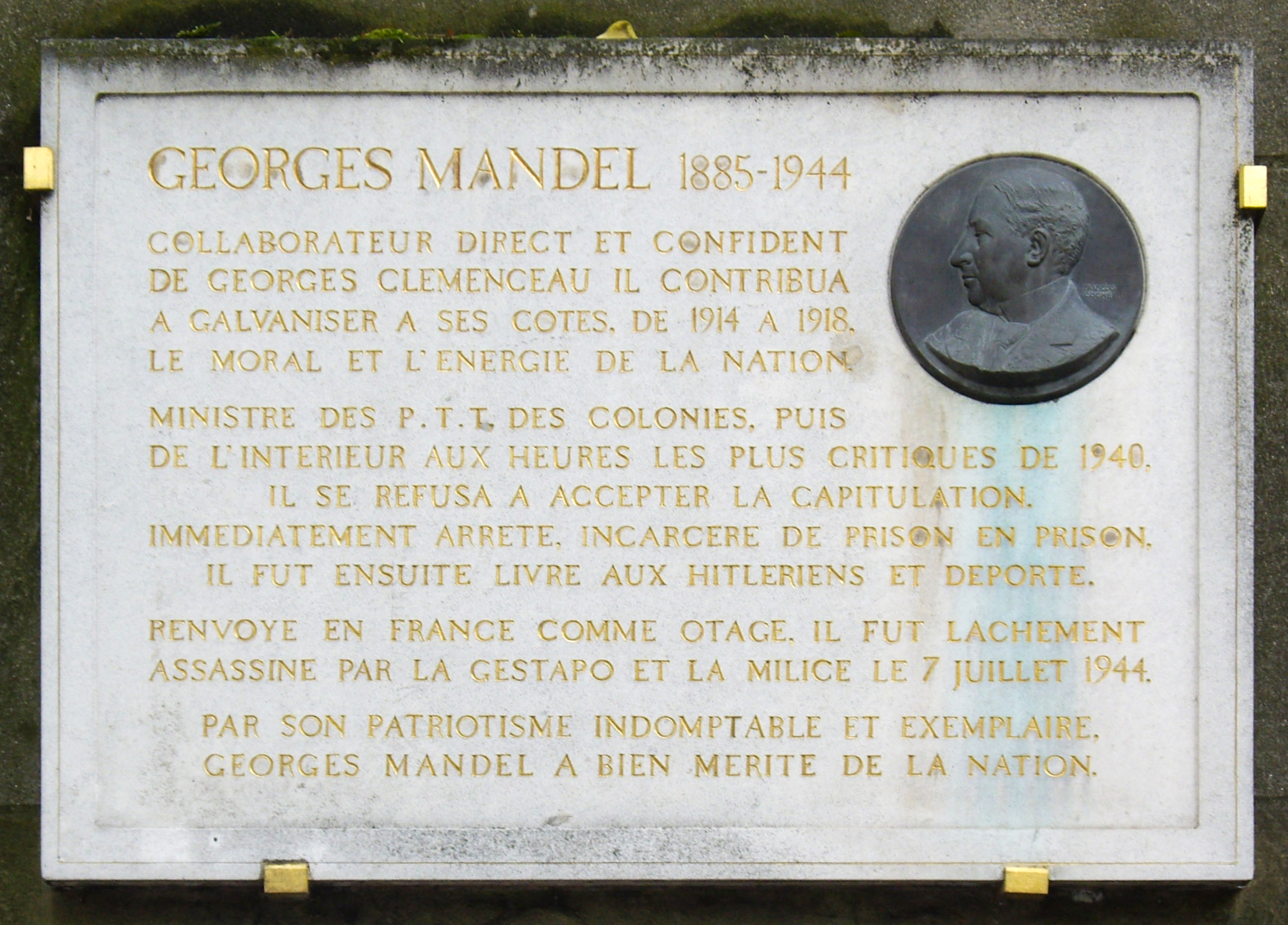 Plaque apposée sur le mur extérieur du cimetière de Passy, avenue Georges-Mandel, Paris 16e.« Georges Mandel, 1885-1944. Collaborateur direct et confident de Georges Clemenceau, il contribua à galvaniser à ses côtés de 1914 à 1918 le moral et l'énergie de la nation. Ministre des PTT, des Colonies, puis de l'Intérieur aux heures les plus critiques de 1940, il se refusa à accepter la capitulation. Immédiatement arrêté, incarcéré de prison en prison, il fut ensuite livré aux hitlériens et déporté. Renvoyé en France comme otage, il fut lâchement assassiné par la Gestapo et la milice le 7 juillet 1944. Par son patriotisme indomptable et exemplaire, Georges Mandel a bien mérité de la nation. »